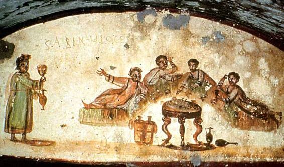 Catacombes des Saints Marcelin et Pierre. Fresque d'un arcosolium représentant un banquet.